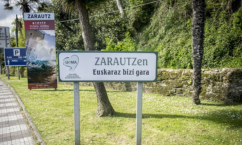 UEMAko seinalea Zarautz